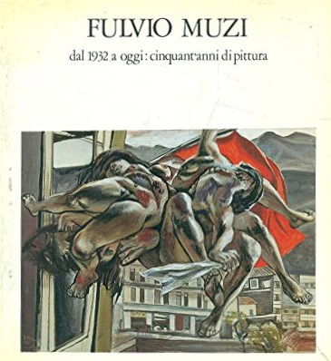 Catalogo della mostra antologica «Fulvio Muzi dal 1932 ad oggi: cinquant'anni di pittura», Castello Cinquecentesco, L'Aquila, 15 luglio - 30 settembre 1982, a cura di Enrico Crispolti ed edito da De Luca Editore, Roma 1982